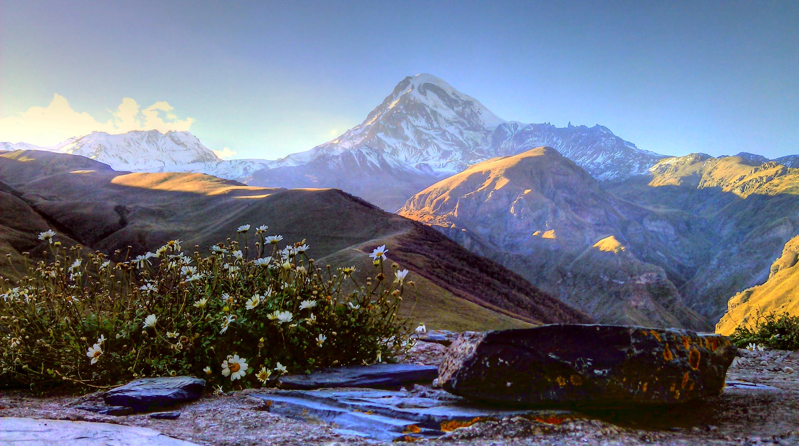 Kasbek from Tsminda Gergeti